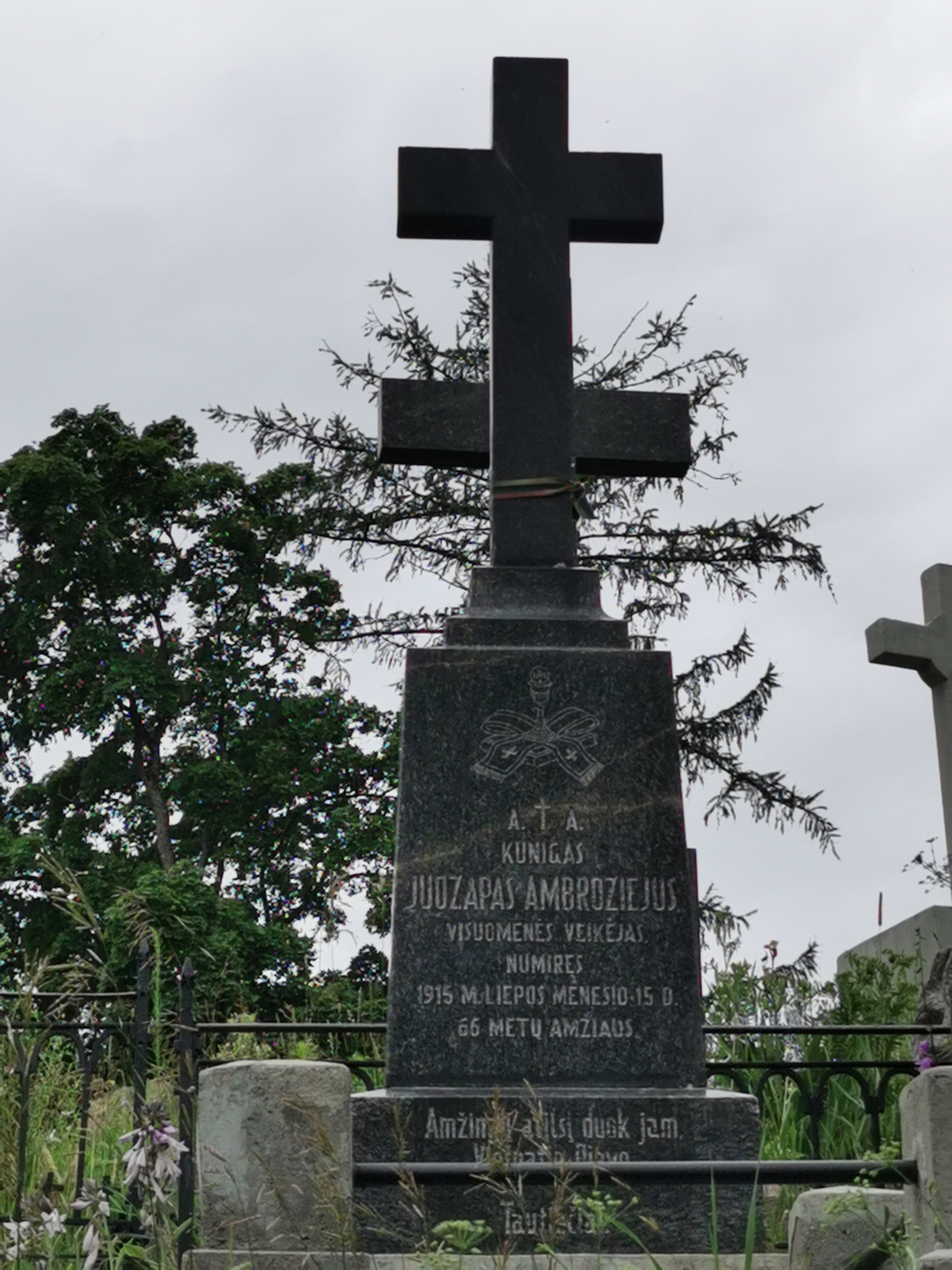 Juozapo Ambraziejaus antkapis